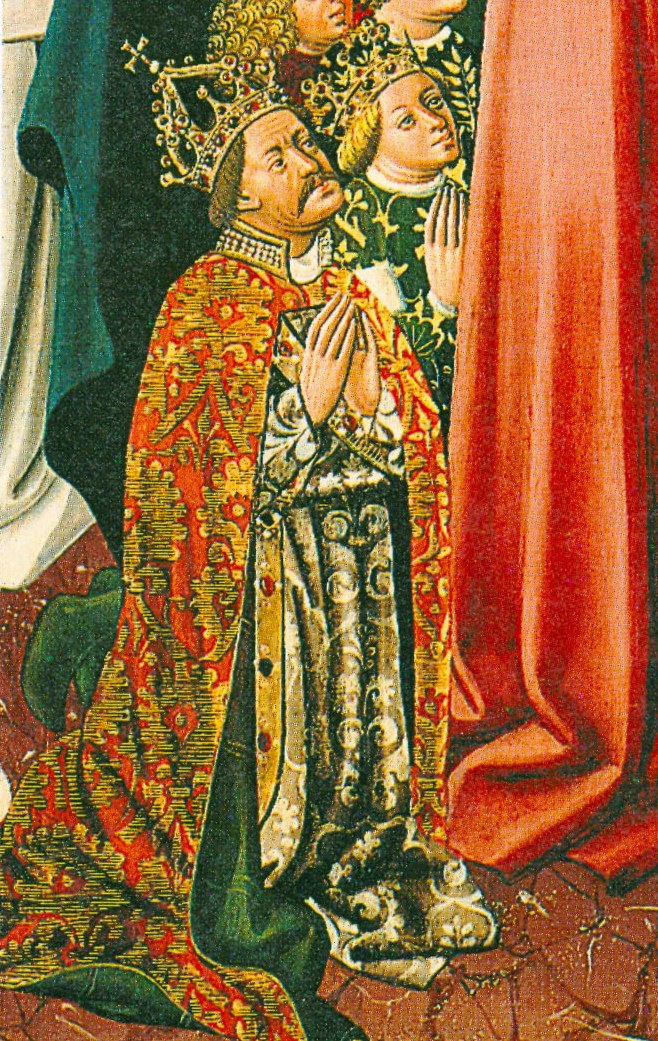 König Albrecht II. und seine Frau Elisabeth Ausschnitt aus dem Albrechtsaltar im Stift Klosterneuburg